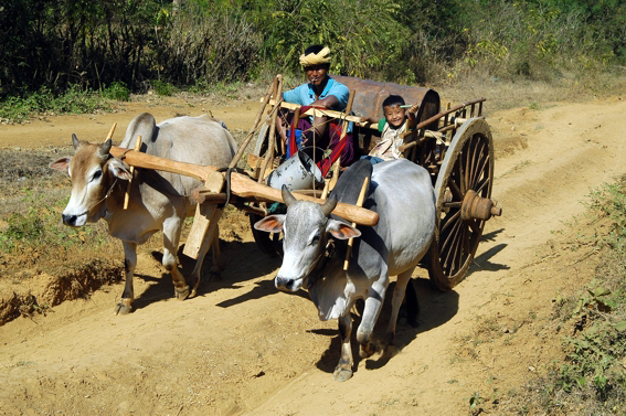 Noch immer ist der Ochsenkarren in Burma eines der wichtigsten Transportmittel